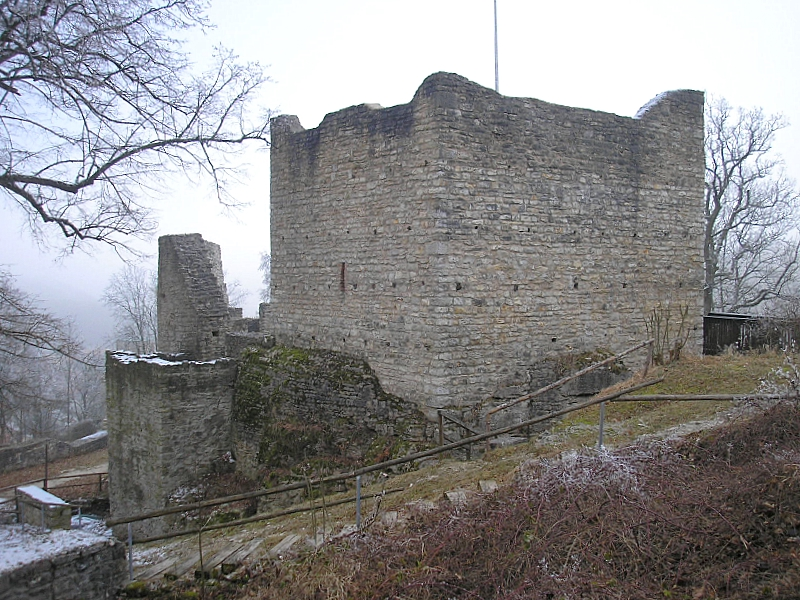 Burg Treuchtlingen (Obere Burg, Landkreis Weißenburg-Gunzenhausen, Mittelfranken). Die Nordseite der Hauptburg nach Osten. Eigene Aufnahme, Dez. 2007 / Treuchtlingen castle (Upper castle, Middle Franconia, Bavaria, Germany). Northern part of the central castle, looking east. Own photo, Dec. 2007